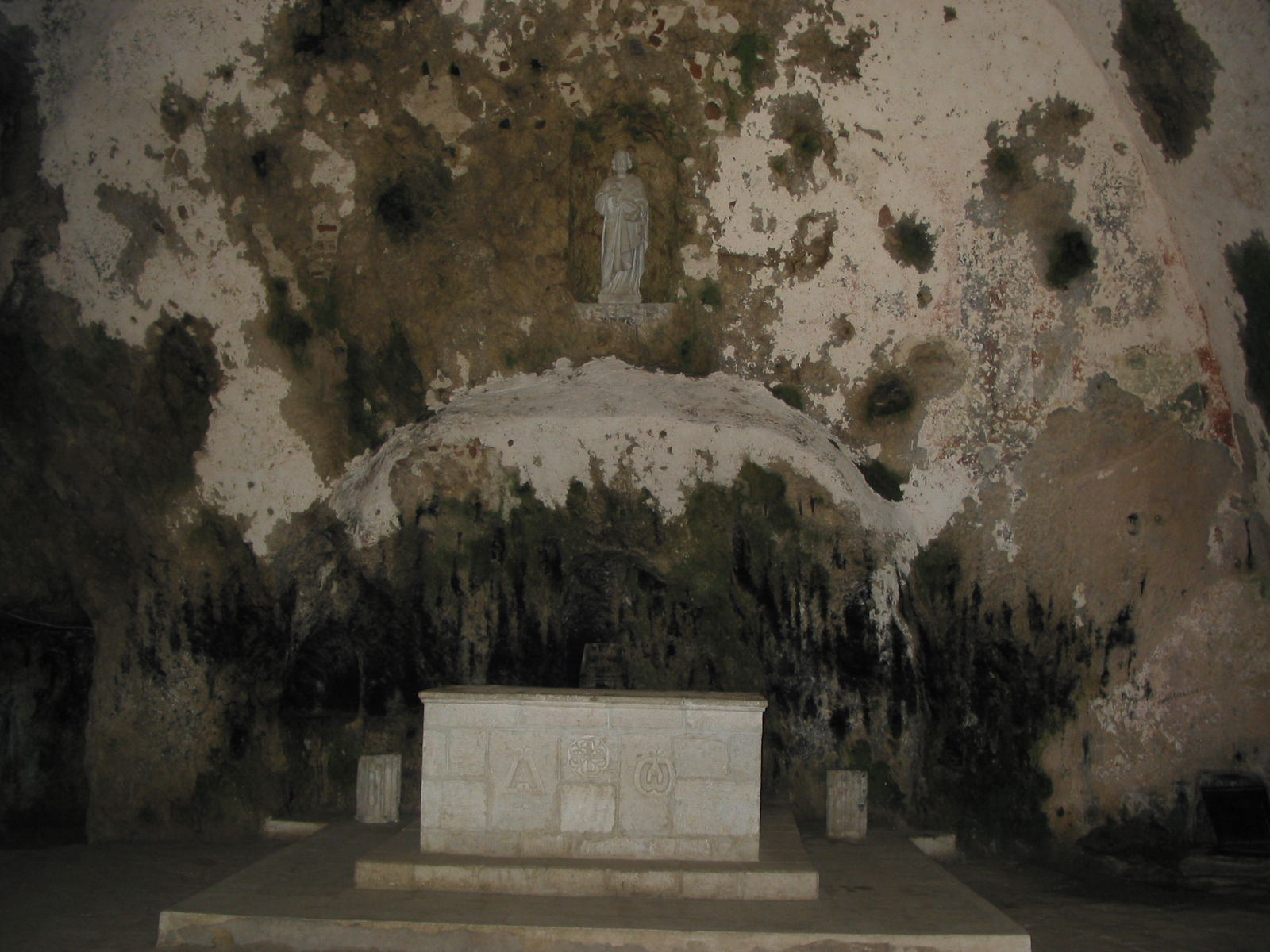 Saint Pierre Church in Antioch. Saint Pierre Kilisesi, Antakya. 22/05/2003 Onur Volkan Ha